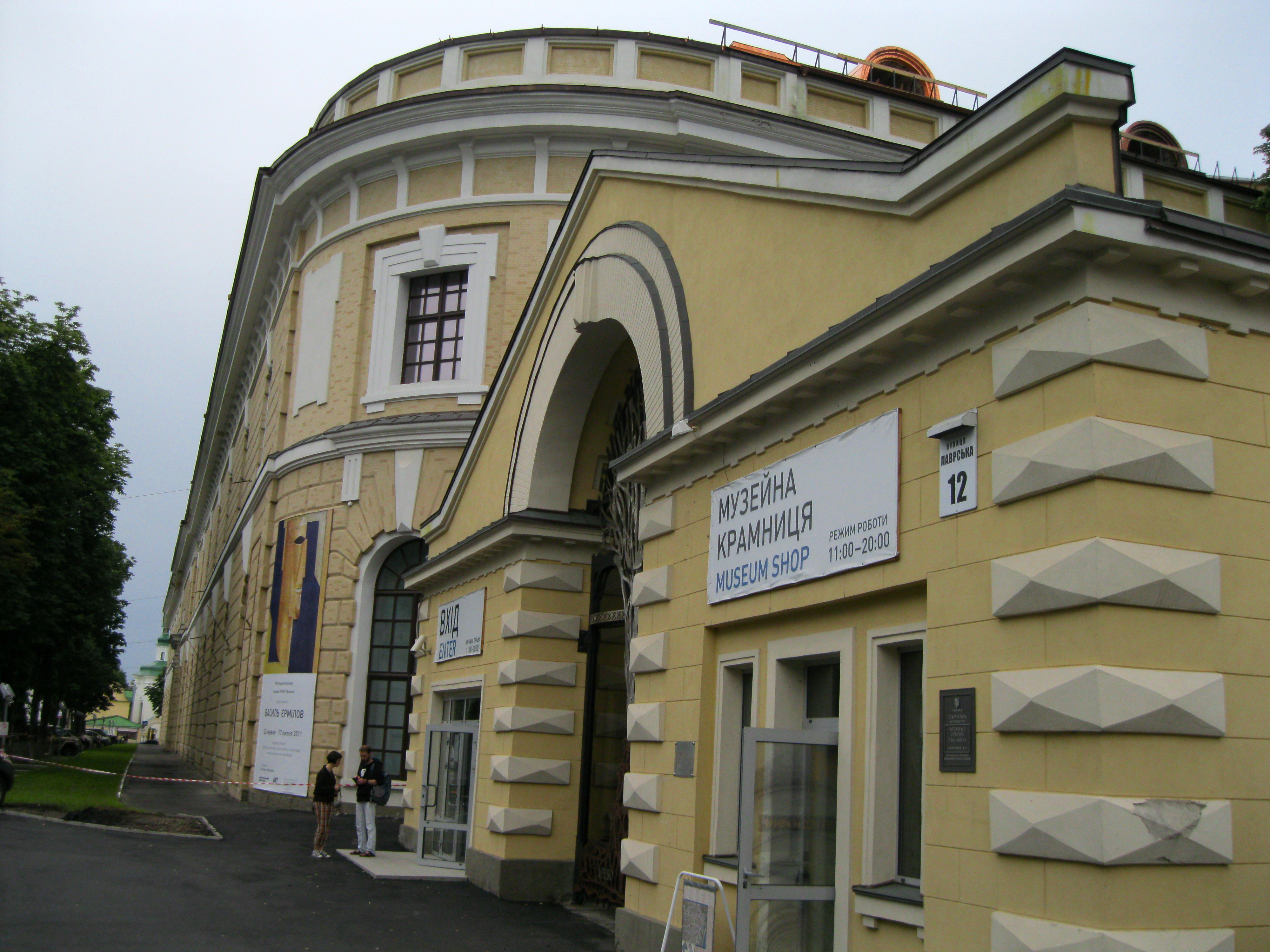 Мистецький арсенал, біля центрального входу